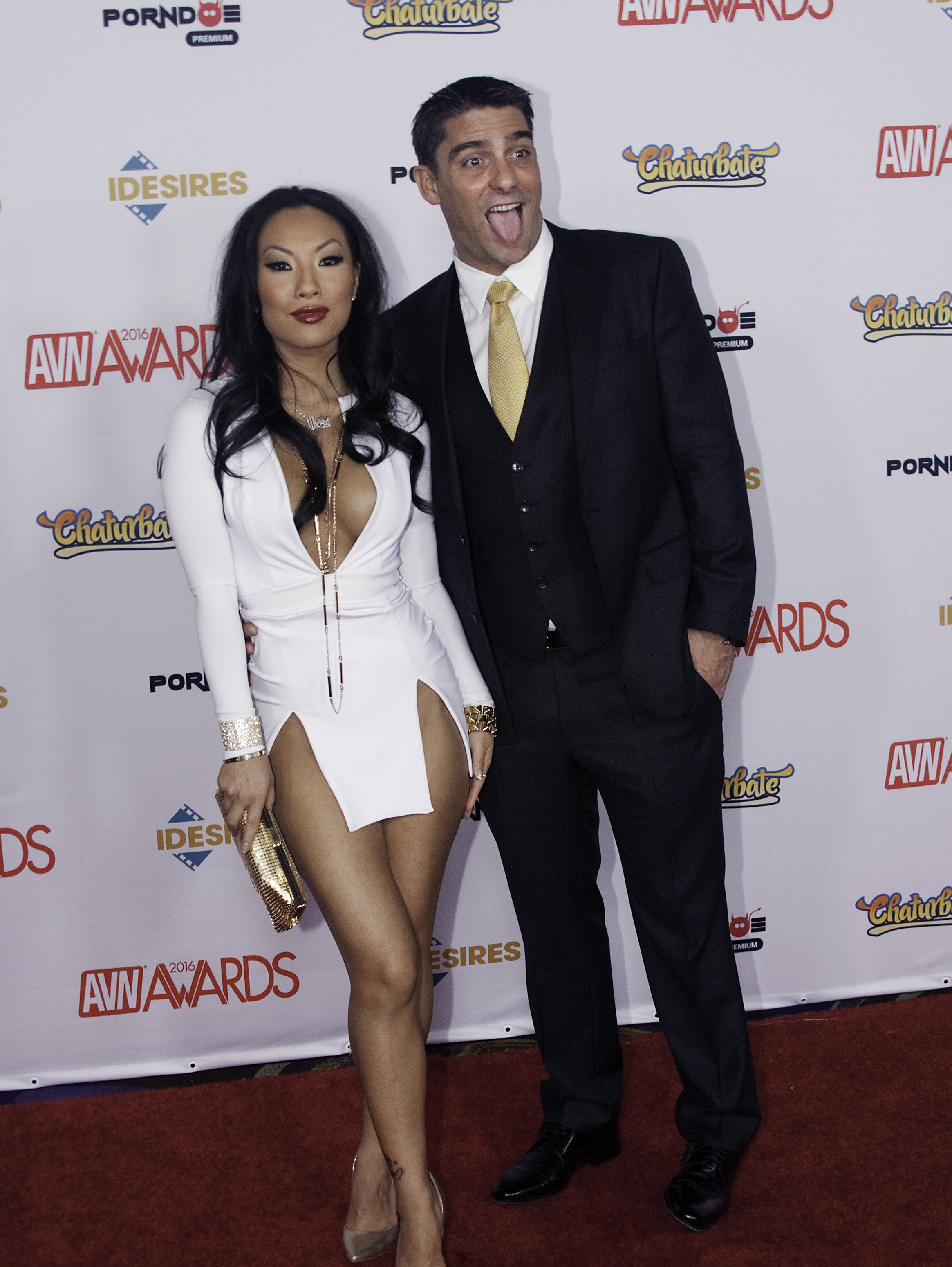 AVN16_0491bas